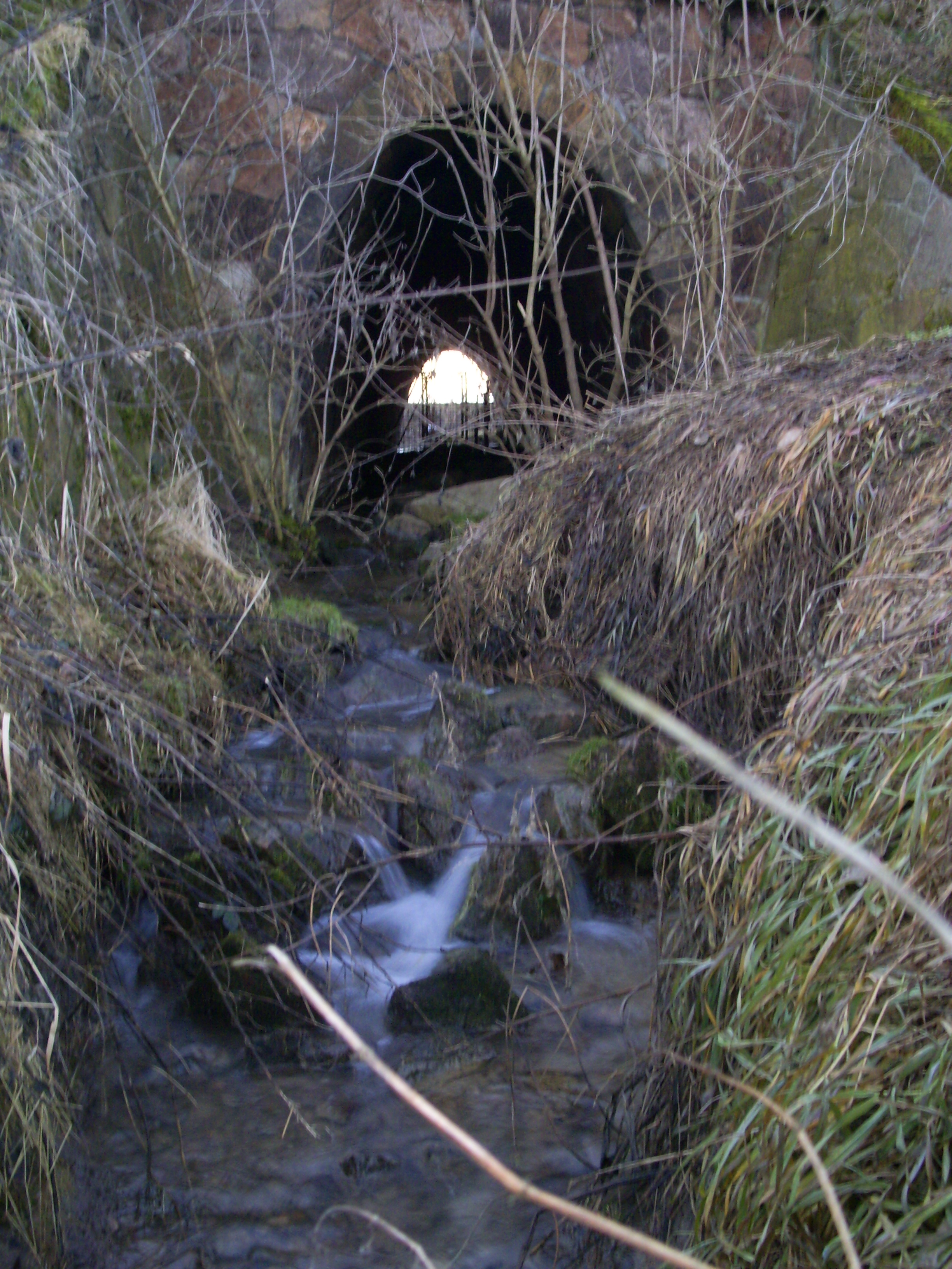 Der Seegraben mit dem Wasser der früher heiligen Quelle Glomac unter dem Bahndamm bei Paltzschen